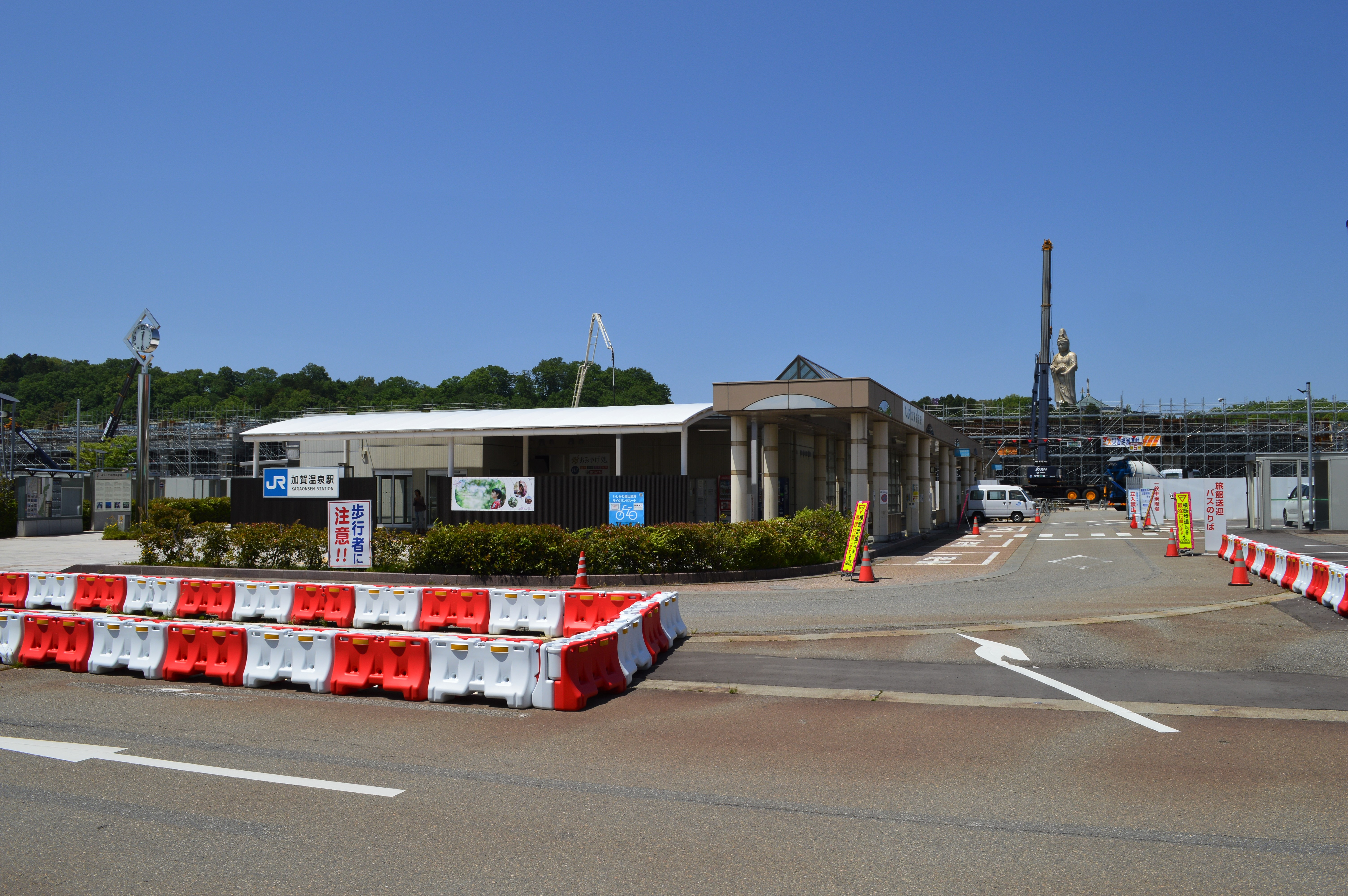 加賀温泉駅 仮駅舎